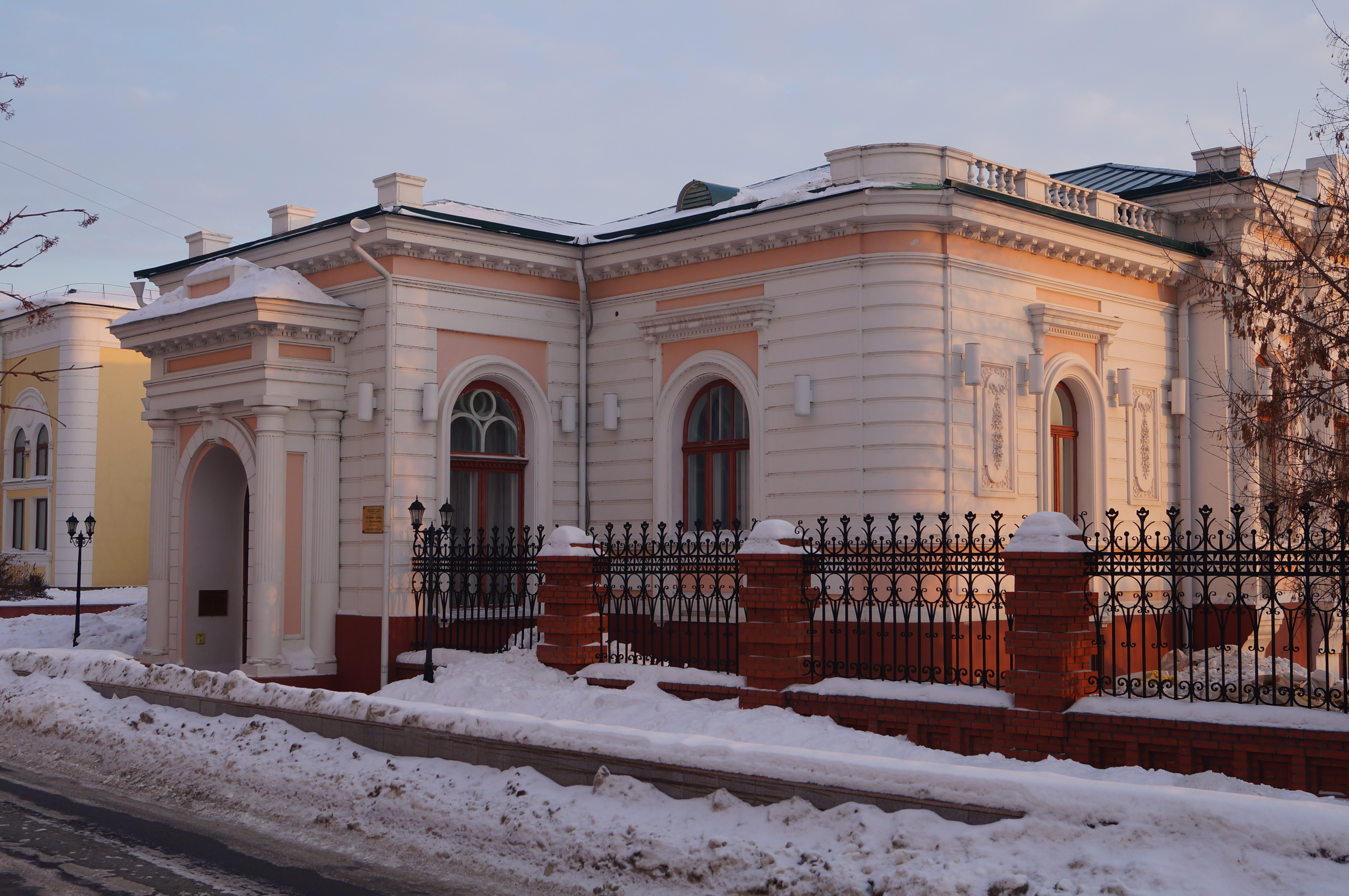 Особняк купца Батюшкина в Омске, служивший резиденцией Верховного правителя А.В. Колчака